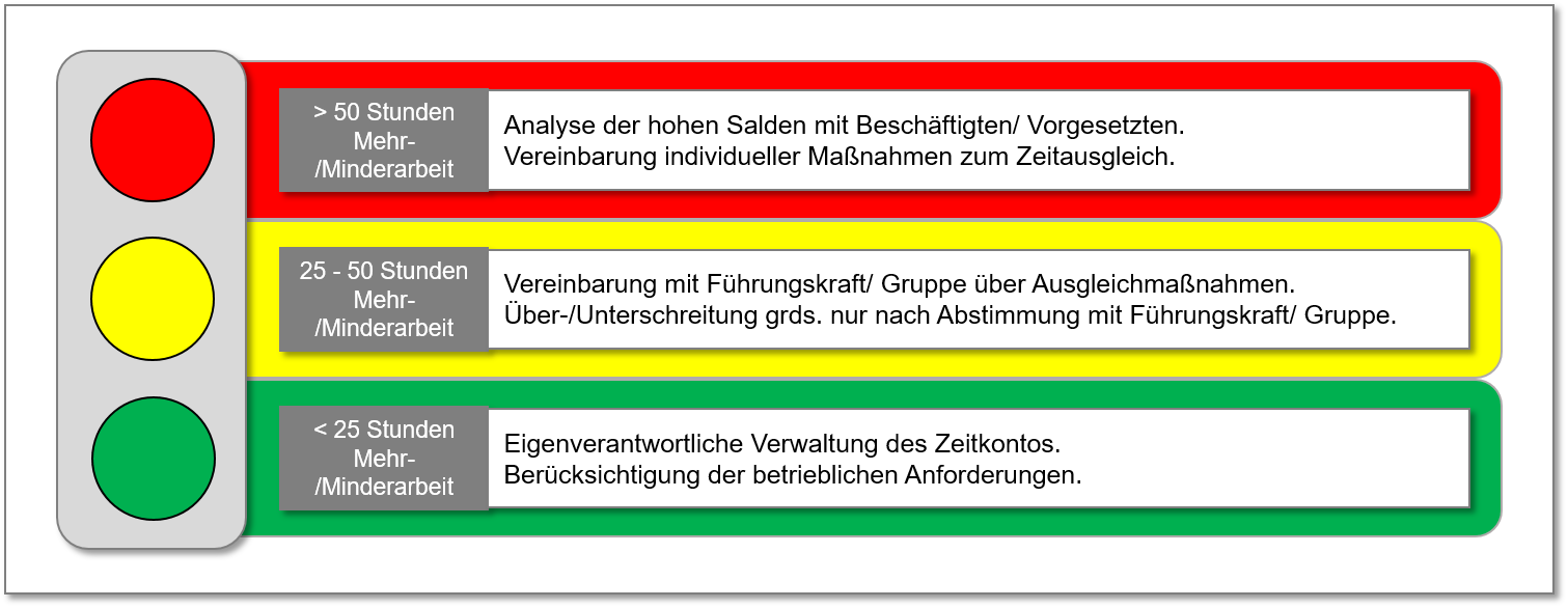 Dargestellt ist eine mögliche Vereinbarung bezüglich eines Ampelkontos. Die Grenzen von 25 und 50 Stunden sind willkürlich gewählt, können aber der Realität entsprechen.